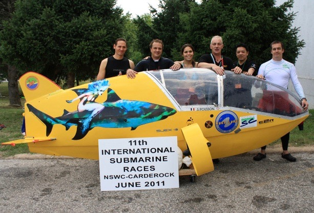 Scubster sous-marin humide